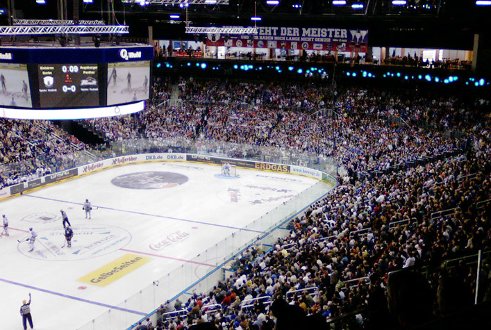 Spielsituation Eisbären Berlin gegen Augsburg Panther in der O2 World